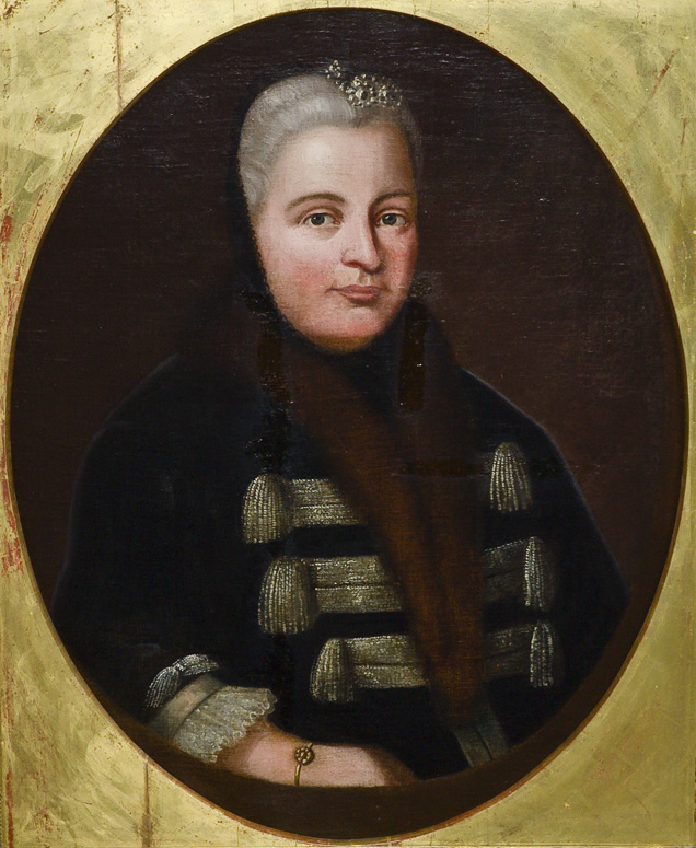 Porträt Margarethe Christiane Auguste zu Leiningen (1694–1761), geb. Gräfin von Danneskiold-Laurvig, Öl auf Leinwand, verso bez. „Schlesinger Pinxit 1788“ 78 x 61 cm. (mit Rahmen?) (Aus dem Nachlaß Konrad Graf zu Leiningen-Westerburg-Altleiningen, Schloß Westerburg 1993.)